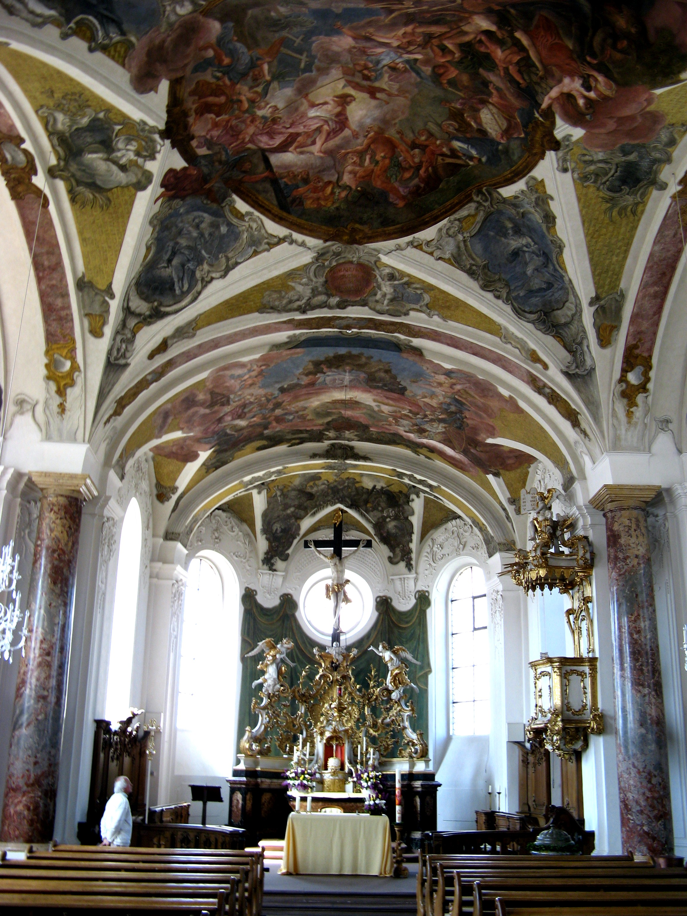 Pfarrkirche St. Cäcilia in Heusenstamm